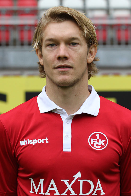 Michael Schulze